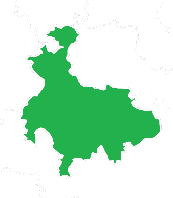 Región Valles Centrales, una de las ocho regiones que conforman al estado mexicano de Oaxaca.